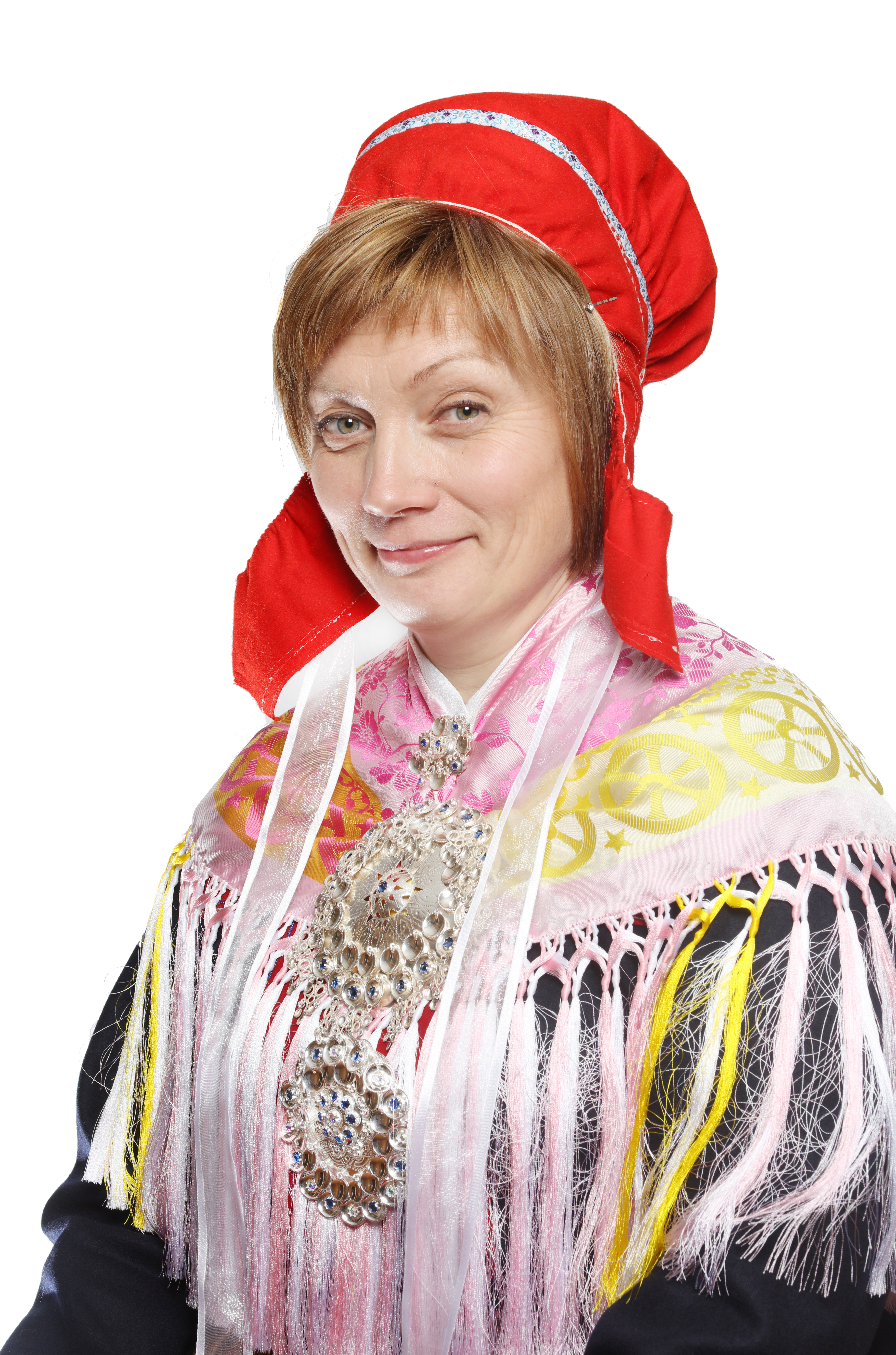 Karen Anette Anti sametingsrepresentant 2017